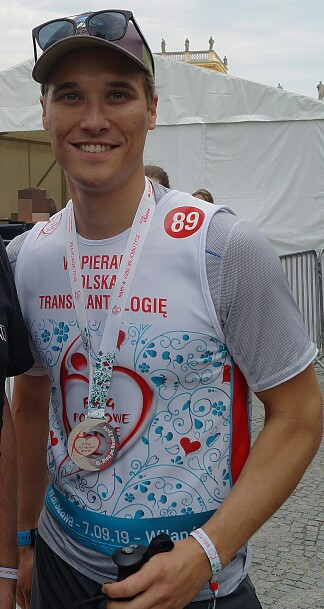 Maurycy Popiel wkrótce odchodzi z serialu TVP2 „M jak miłość”, gdzie postać grana przez Maurycego Popiela umrze w więzieniu, i przechodzi do obsady serialu Polsatu „W rytmie serca”.